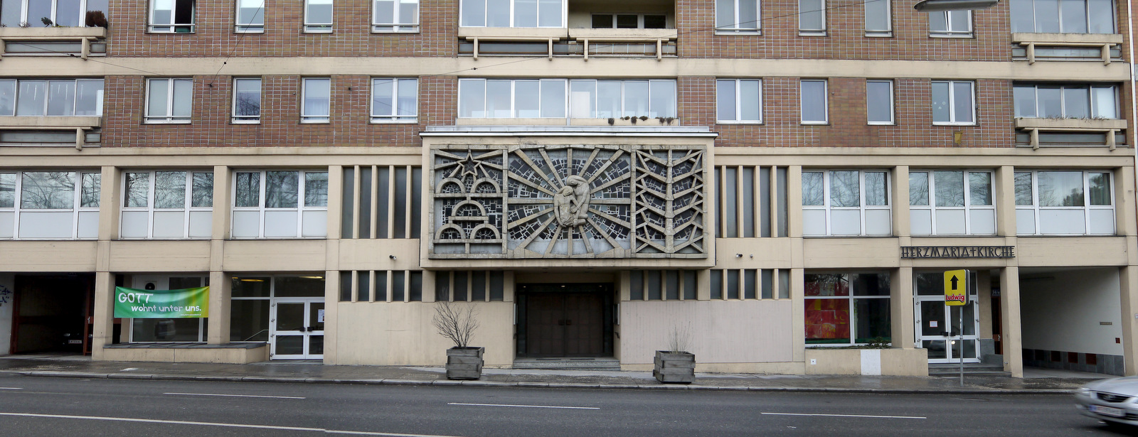 P1270044 pfarrkirche unbeflecktes herz maria stitch